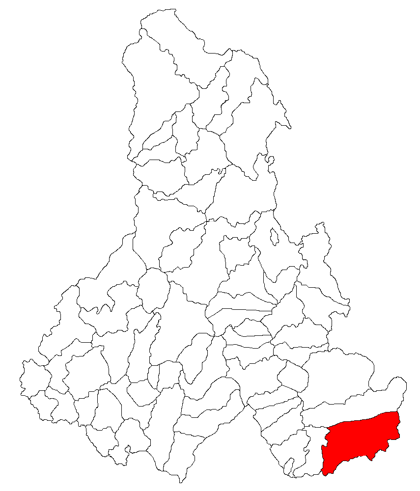 Categorie:Hărţi ale judeţului Harghita Contents 1 Licensing 2 Sursă 3 Licensing 4 Original upload log Licensing Sursă ro::Imagine:Harta_jud_Harghita.png